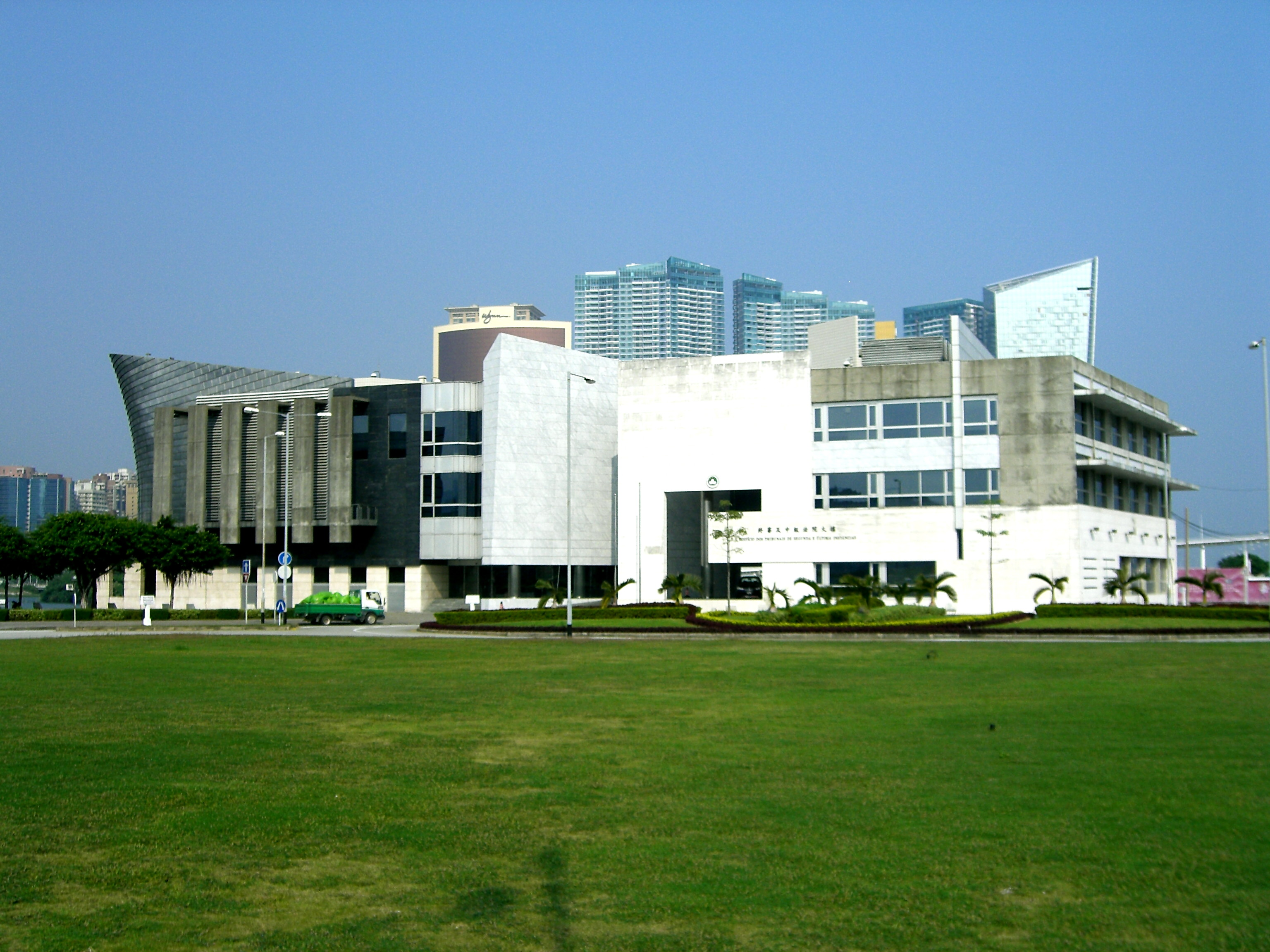 Edf. dos Tribunais de Segunda e Última Instâncias